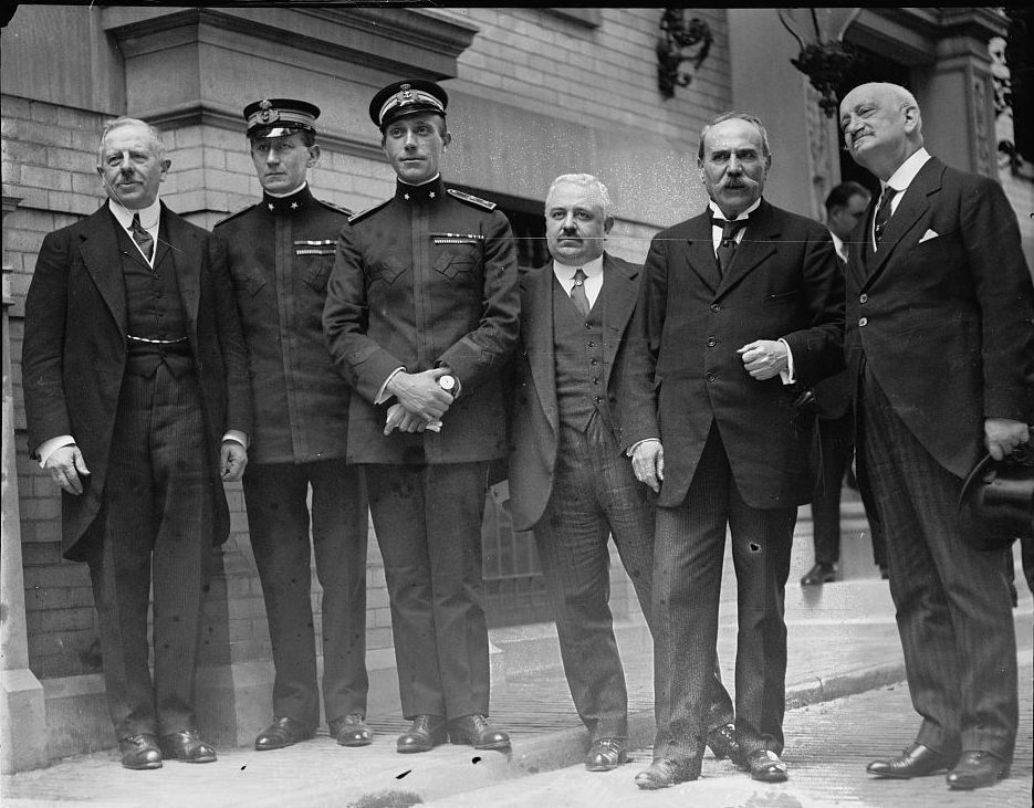 Delegación italiana durante la Primera Guerra Mundial S.C. Porsarelli, el senador Marconi, el príncipde de Undina, Francesco Saverio Nitti, el señor Curfilli y el señor Arlotta.